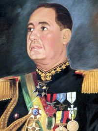 Ex presidente Hugo Ballivian Rojas